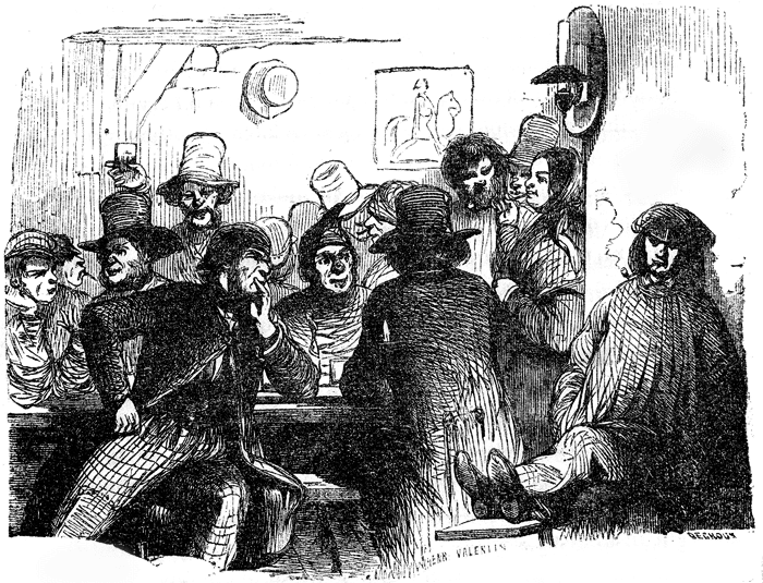 Les Mystères de Paris, le tapis franc, illustration de 1843